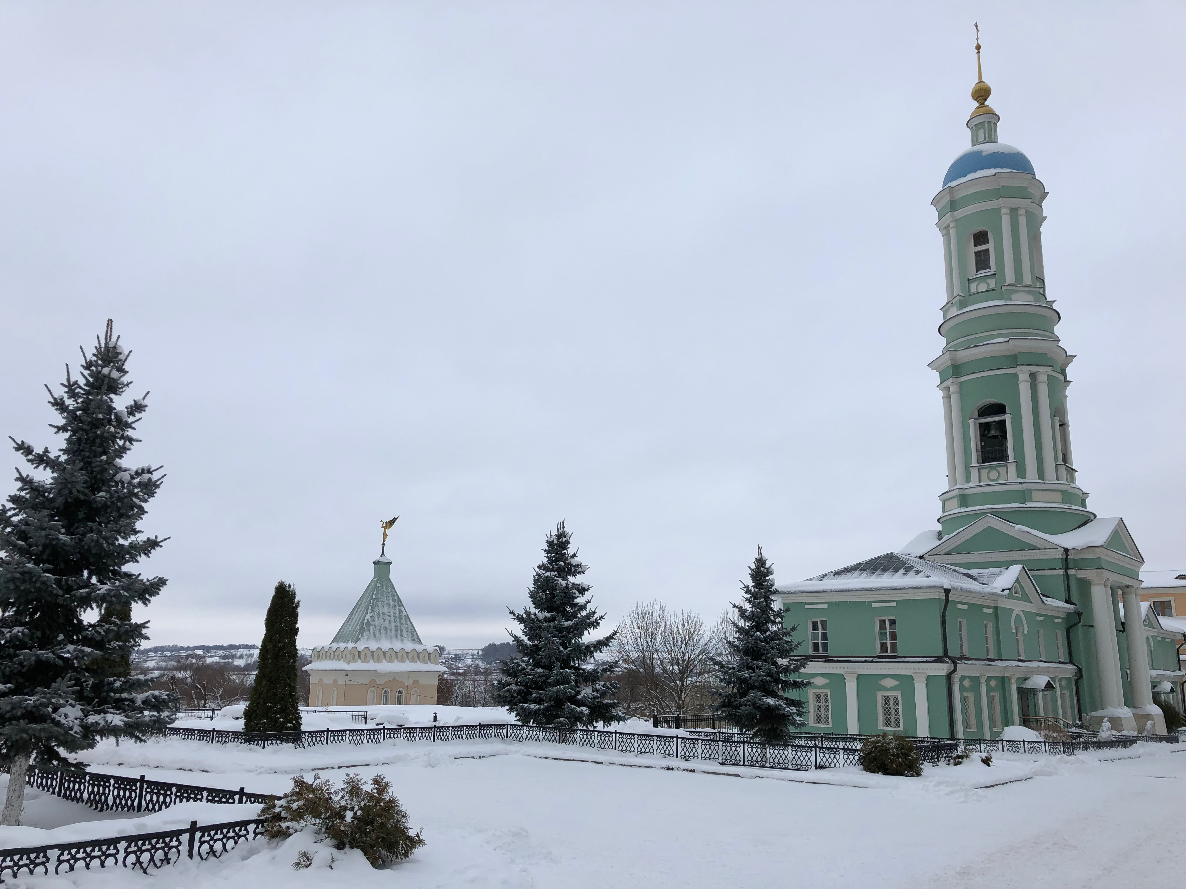 Оптина Пустынь